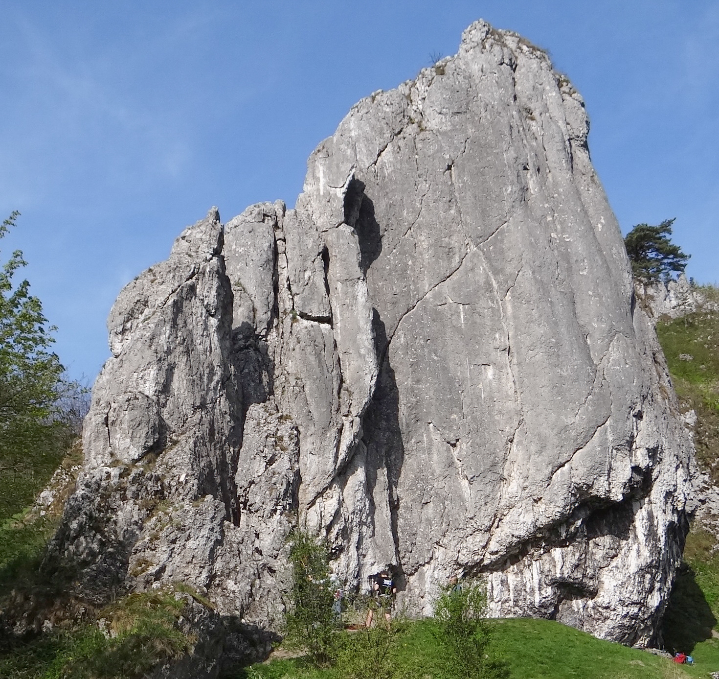 Mur Pokutników w Dolinie Bolechowickiej